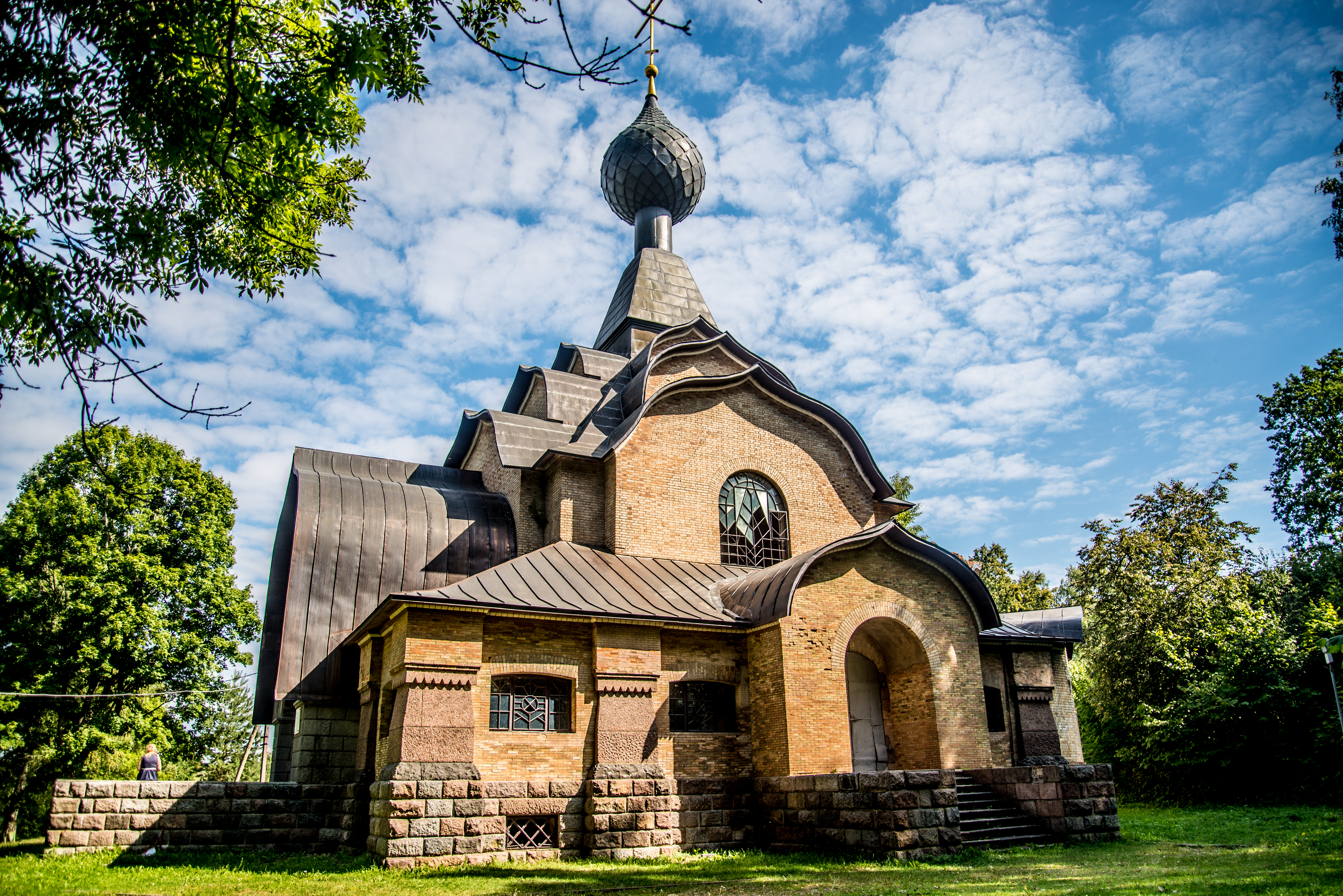 Церковь Сошествия Святого Духа: с. Фленово, Талашкино, Смоленский район, Смоленская область